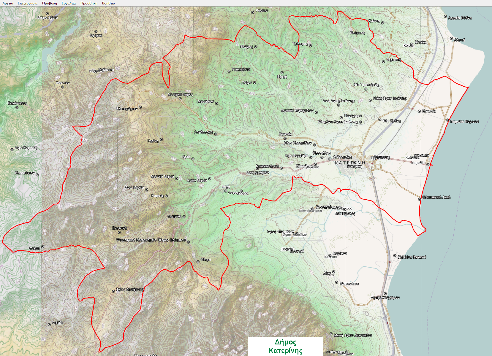 Τοπογραφικός χάρτης του Δήμου Κατερίνης